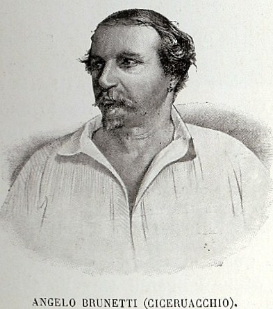 L'immagine si trova nel libro: I liberatori Glorie e figure del Risorgimento di Pasquale de Luce, stampato dall'Istituto Italiano di Arti Grafiche- Editore di Bergamo nel 1909